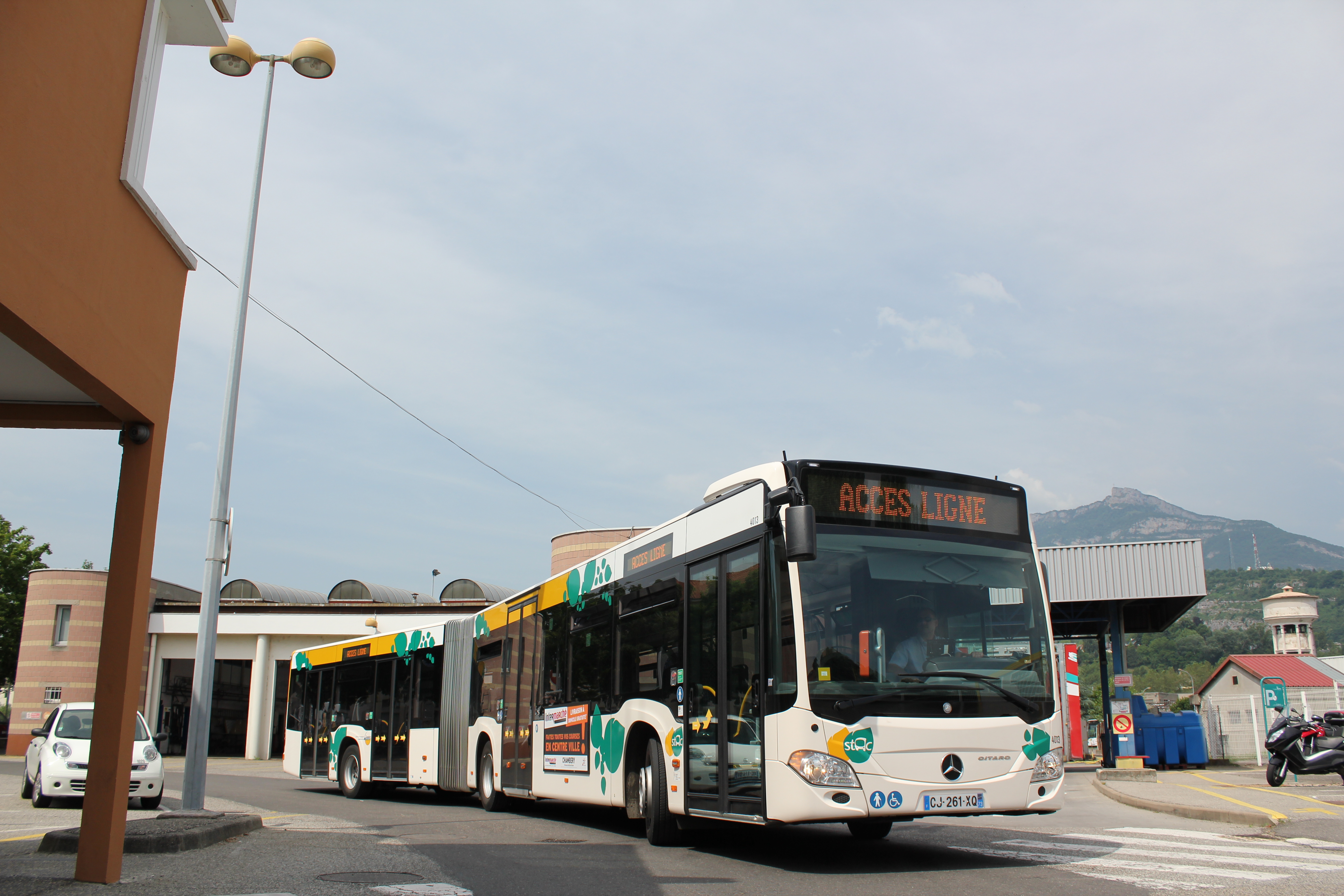 L'autobus articulé Mercedes O.530 Citaro G C2 est vu en sortie de dépôt STAC.